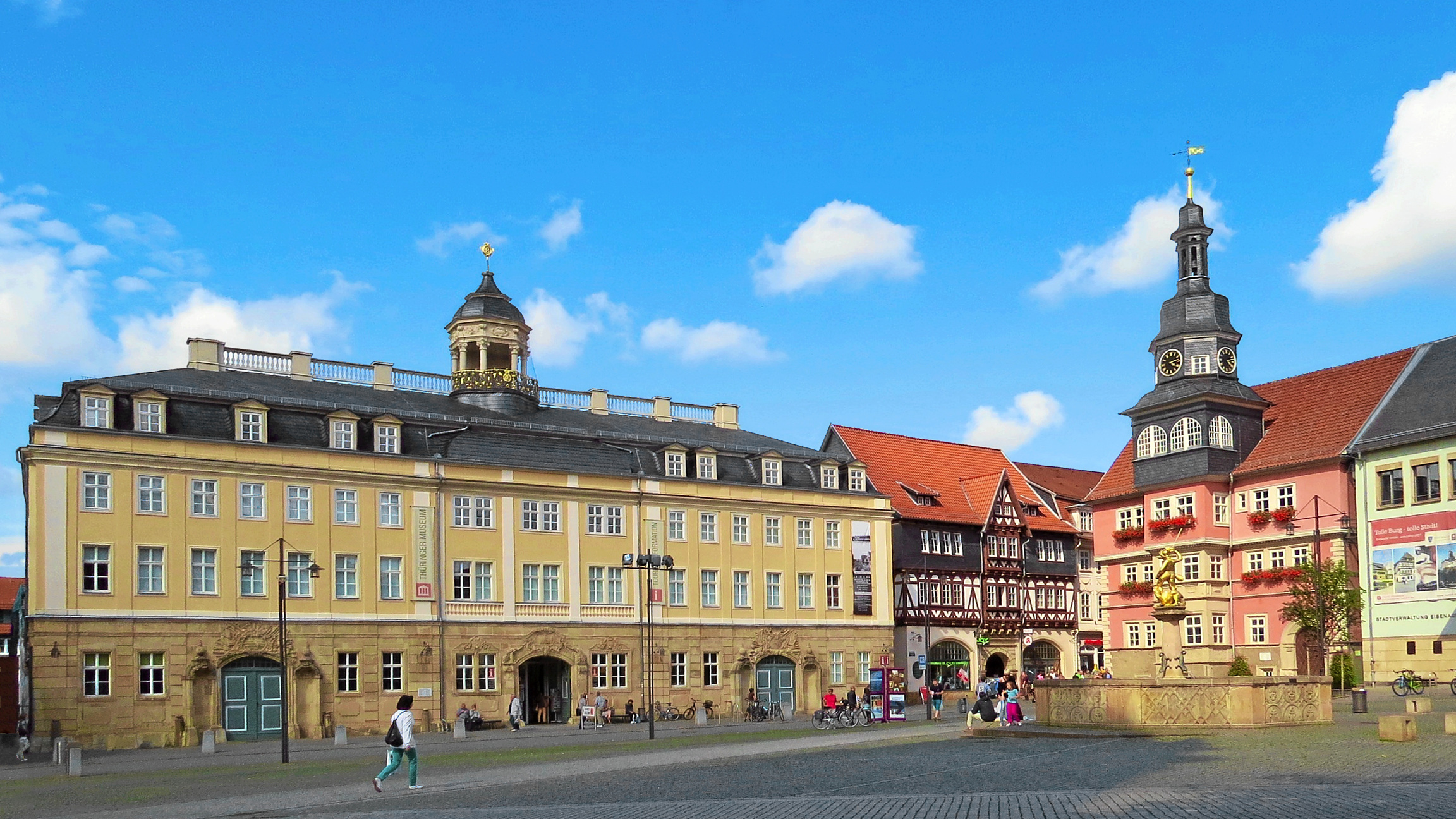 Eisenach 05-08-2014